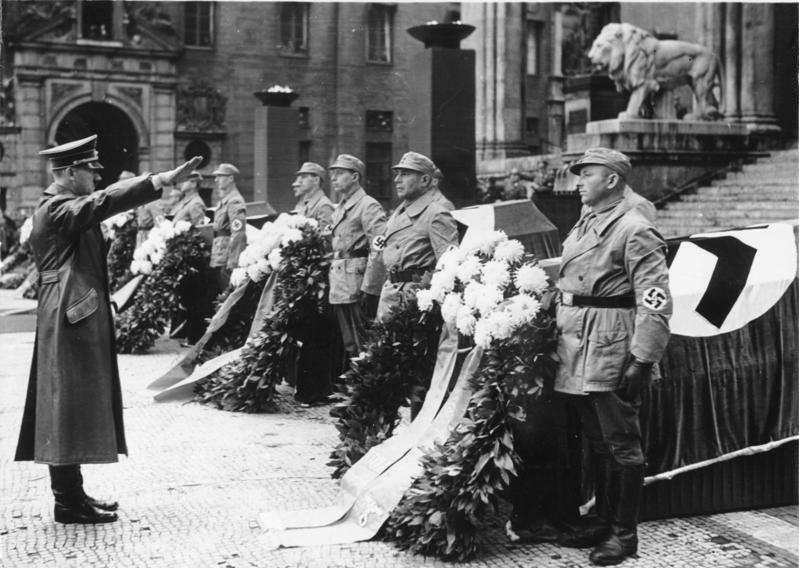 Factual corrections and alternative descriptions are encouraged separately from the original description. Additionally errors can be reported at this page to inform the Bundesarchiv. Original historic description: München, Adolf Hitler vor Feldherrenhalle Der feierliche Staatsakt vor der Feldherrnhalle in München (11.11.1939) für die sieben Opfer des verbrecherischen Sprengstoffanschlags im Bürgerbräukeller (am 8.11.1939). Der Führer erweist den Toten die letzte Ehre. Foto Wag. 11.11.1939 Abgebildete Personen: Hitler, Adolf: Reichskanzler, Deutschland